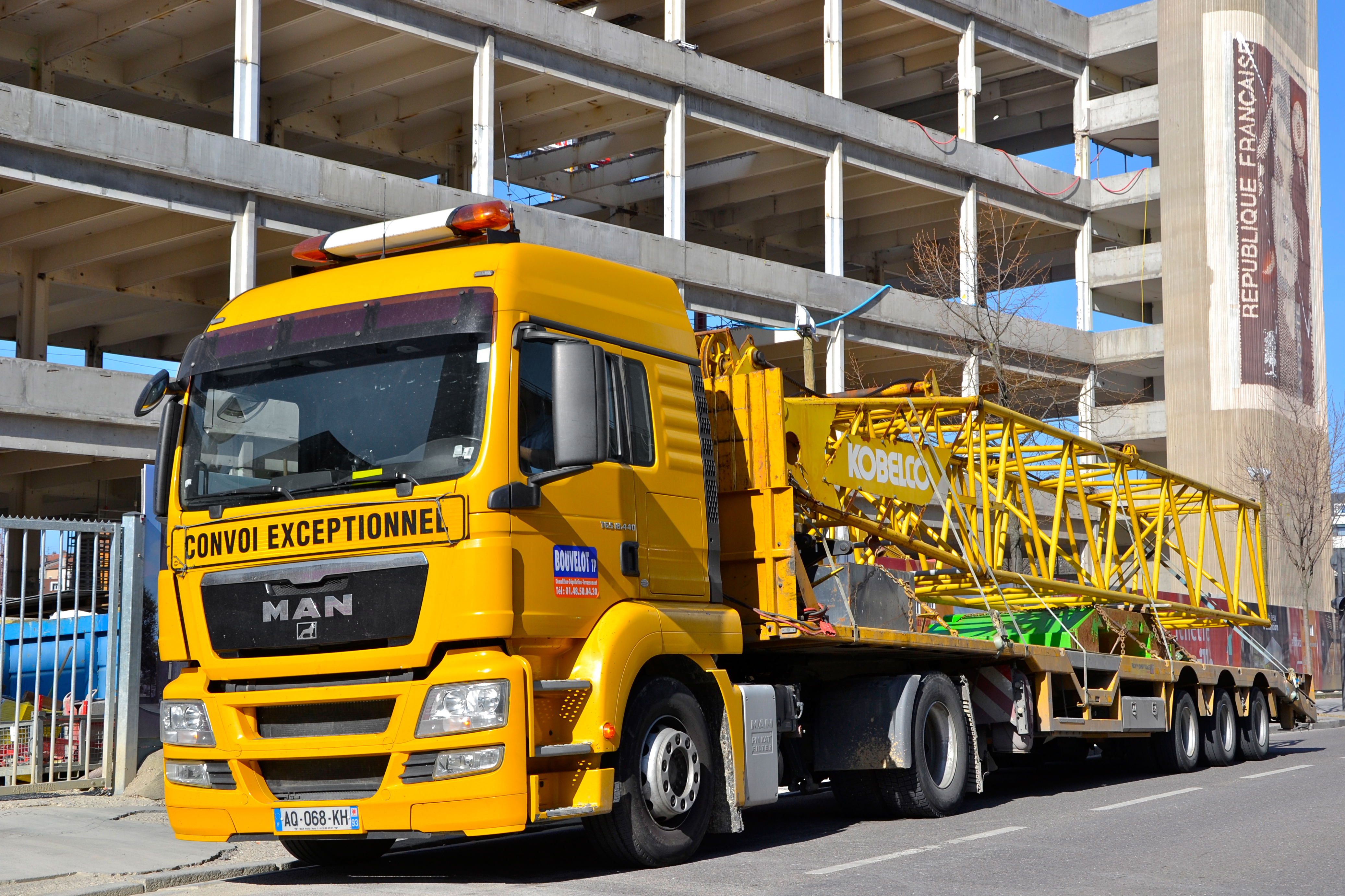 Chantier du nouveau centre des congrès de la ville de Nancy. Il remplacera l'actuel palais des congrès construit en 1977. Le projet se situe sur le site de l'ancien tri postal, construit par Prouvé. Il conserve le bâtiment principal et y ajoute un autre à l'arrière. Le projet comprend deux auditoriums de 850 places et 300 places, quinze salles de commissions, deux espaces de restauration de 900 et 300 places, un espace d’exposition et un parking souterrain de 450 places. Caractéristiques Ville : Nancy (54000) Quartier : Charles III - Centre ville Adresse: 8, boulevard Joffre Livraison : 2013 Fonction : Communications, Commerces et activités Architecte : Atelier Barani Entreprise générale : Eiffage Construction Lorraine Données techniques Niveaux : R+3 Hauteur : 28.92 m SHON : 21 159 m² SHOB : 54 072 m² Surface du terrain : 13 065 m²